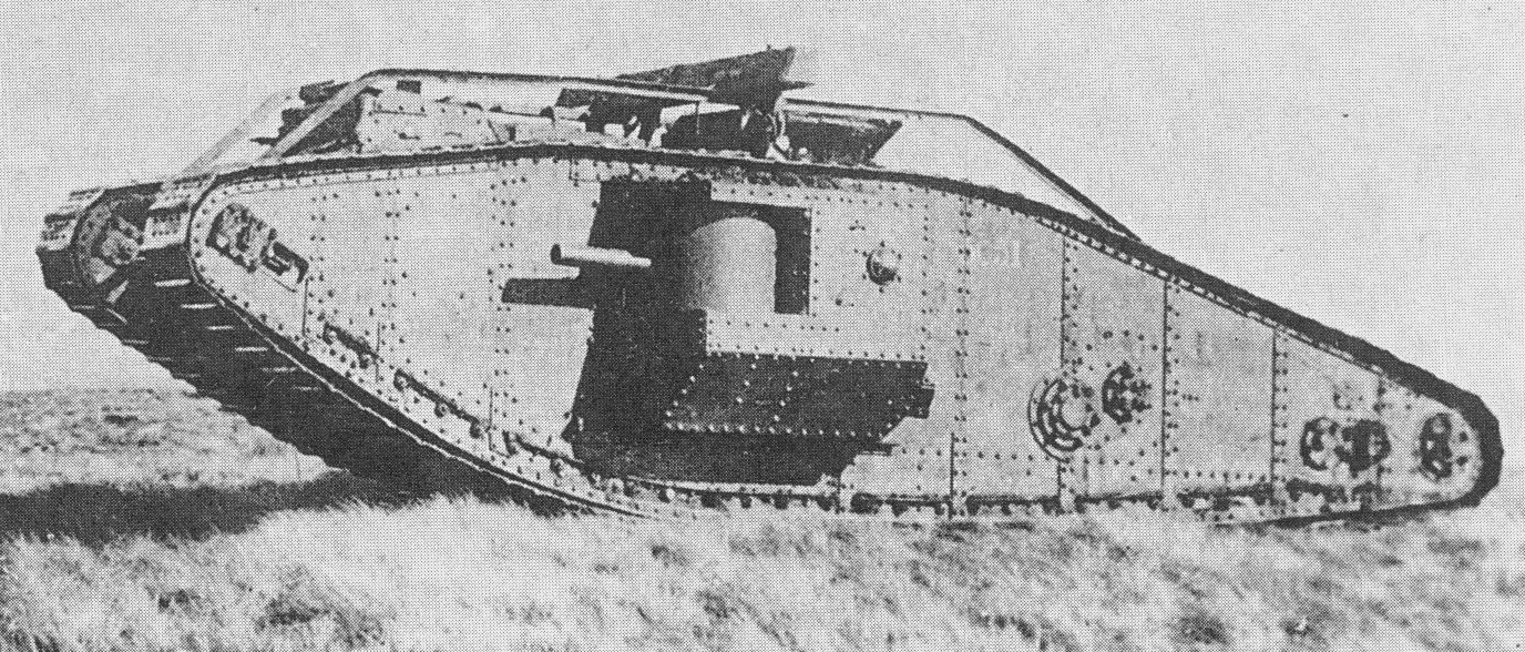 Digitale reproductie foto Mark VII tank